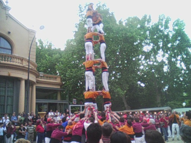 Castellers a l'Aplec del Caragol en 2005